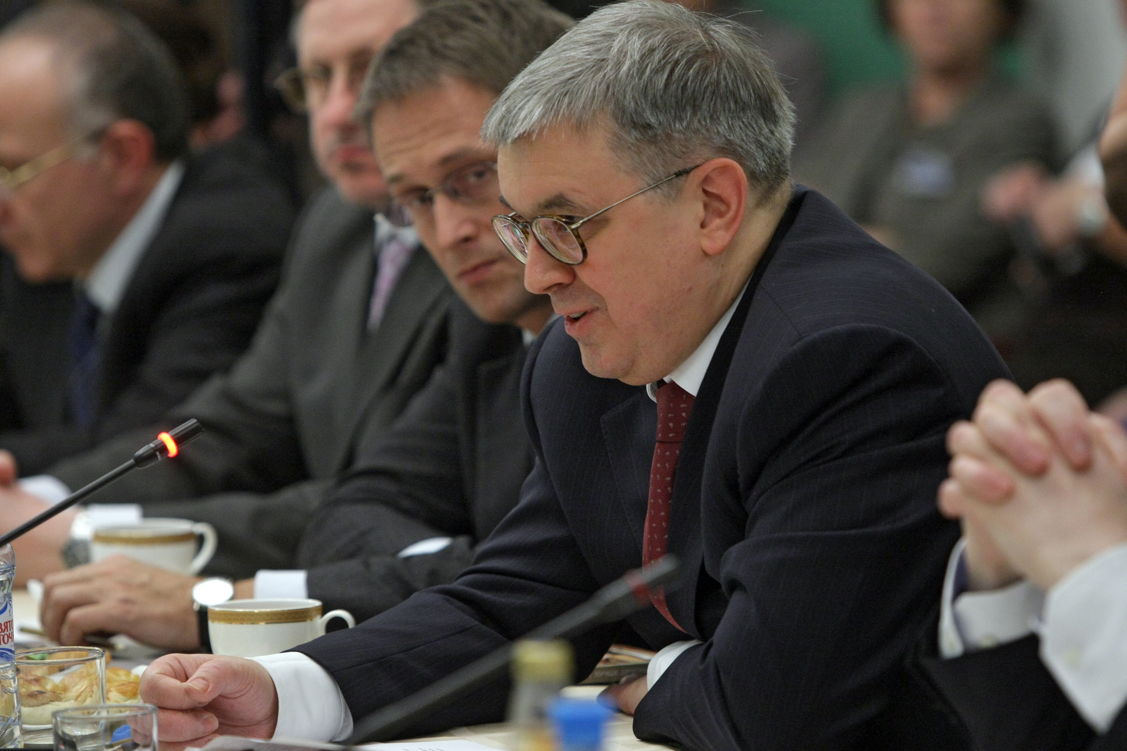 Ректор Государственного университета – Высшей школы экономики Я. И. Кузьминов на встрече преподавательского состава ГУВШЭ с Председателем Правительства Владимиром Путиным